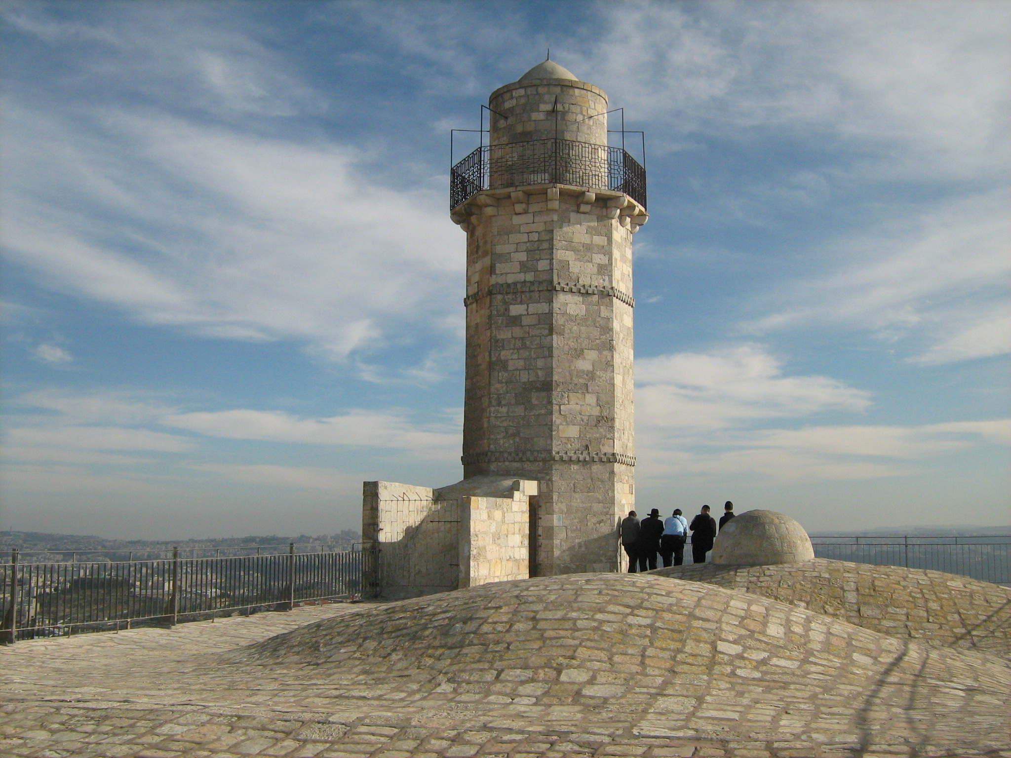 נבי סמואל